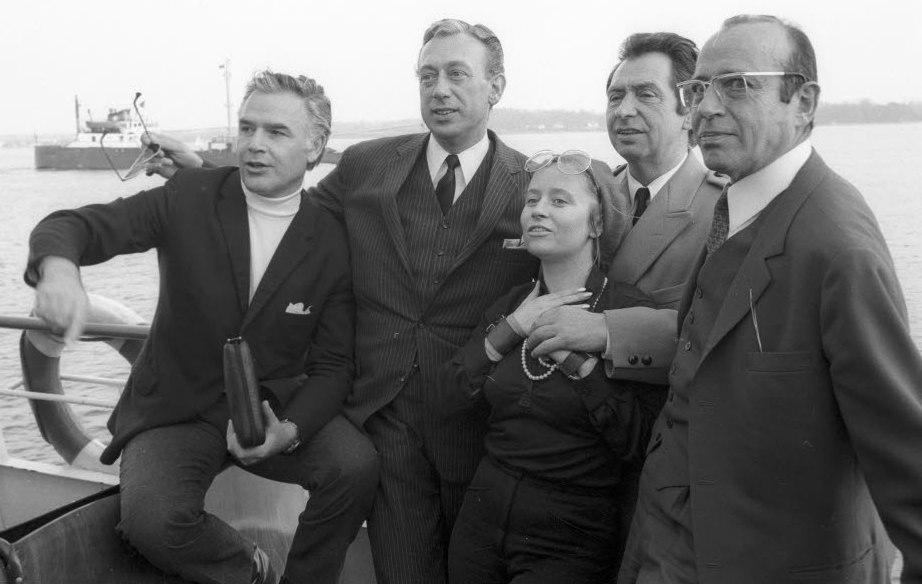 Hauptdarsteller und Regisseur auf Förderundfahrt mit der MÖNKEBERG. V.l. Joachim Fuchsberger, Horst Tappert, Hilde Brand, Regisseur Alfred Vohrer, Konrad Georg.